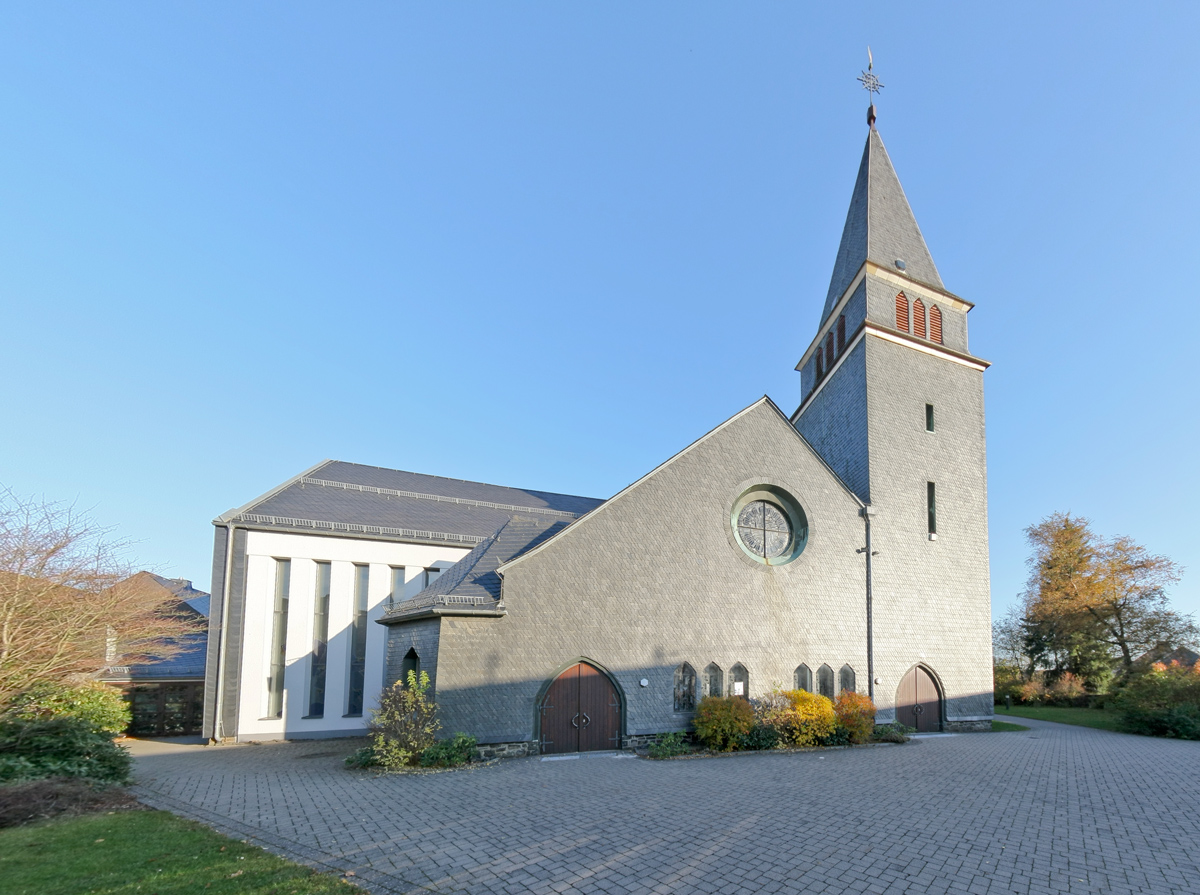 Katholische Pfarrkirche Mariä Heimsuchung in Höhn, Westerwald